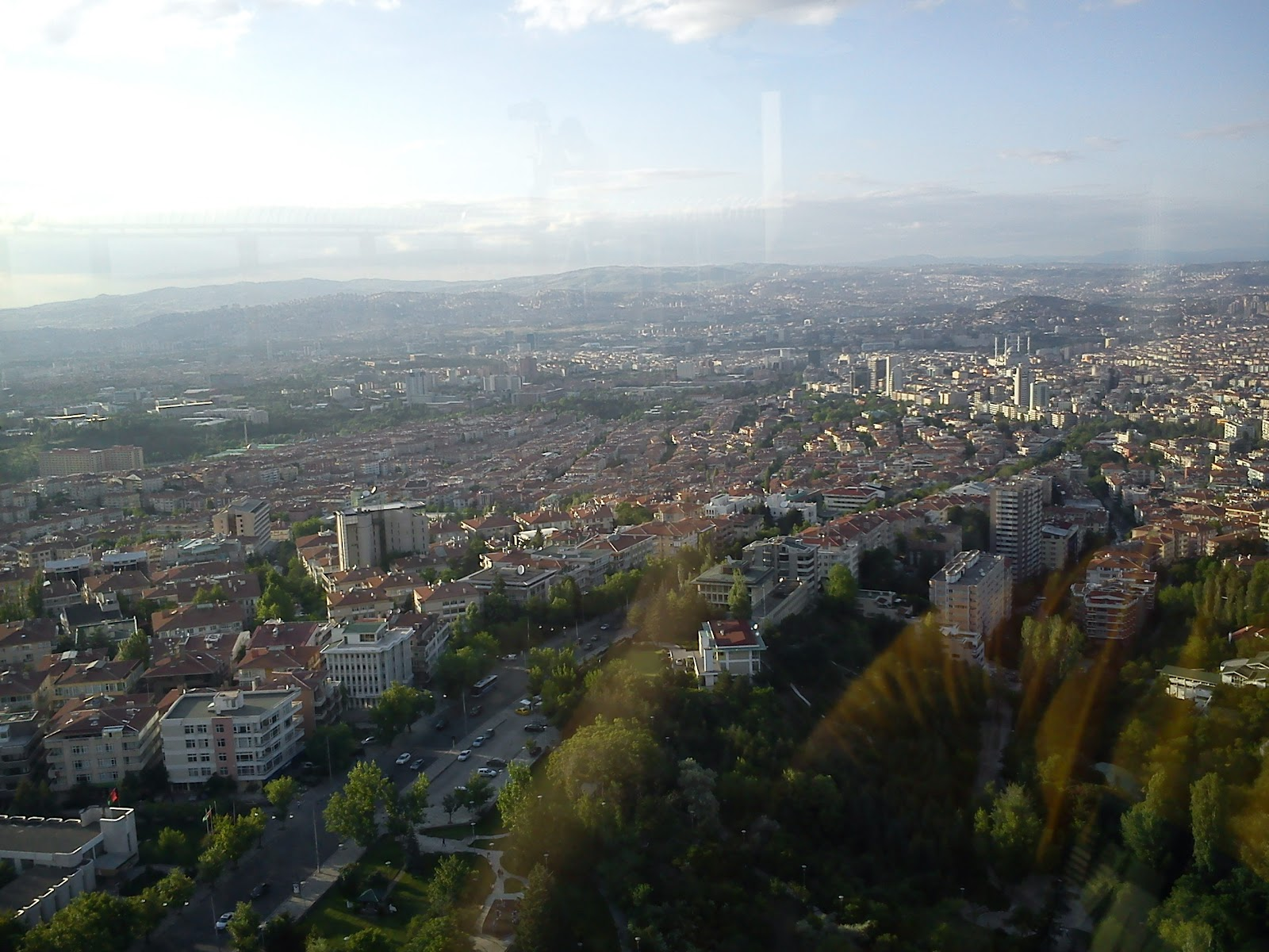 Ankara ilinin sembol yapılarından Atakule'den Ankara panoraması.